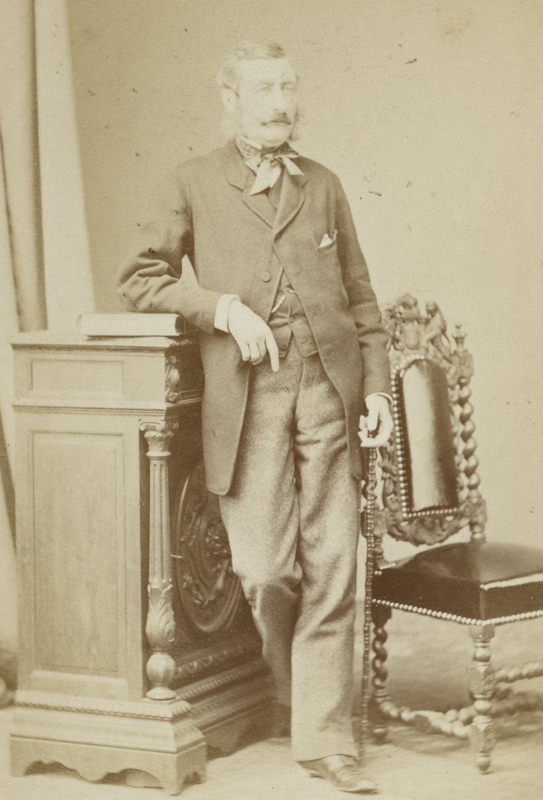 Jean François Albert du Pouget de Nadaillac